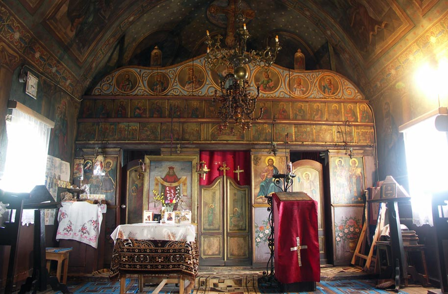 Imagine din interiorul bisericii, în navă spre iconostas. Foto: Alexandru Baboş, iulie 2007.